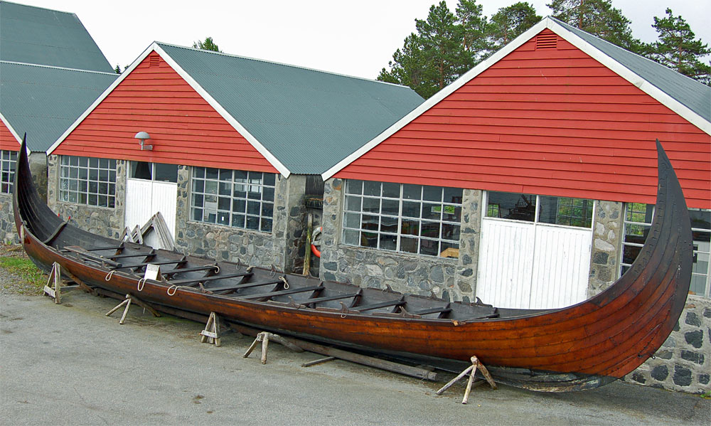 Die Replica des Kvalsund-Bootes im Sunnmøre Museum in Ålesund.